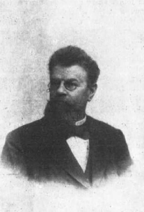 Patrik Blažek (1851-1905), český novinář, voják, spisovatel a nakladatel